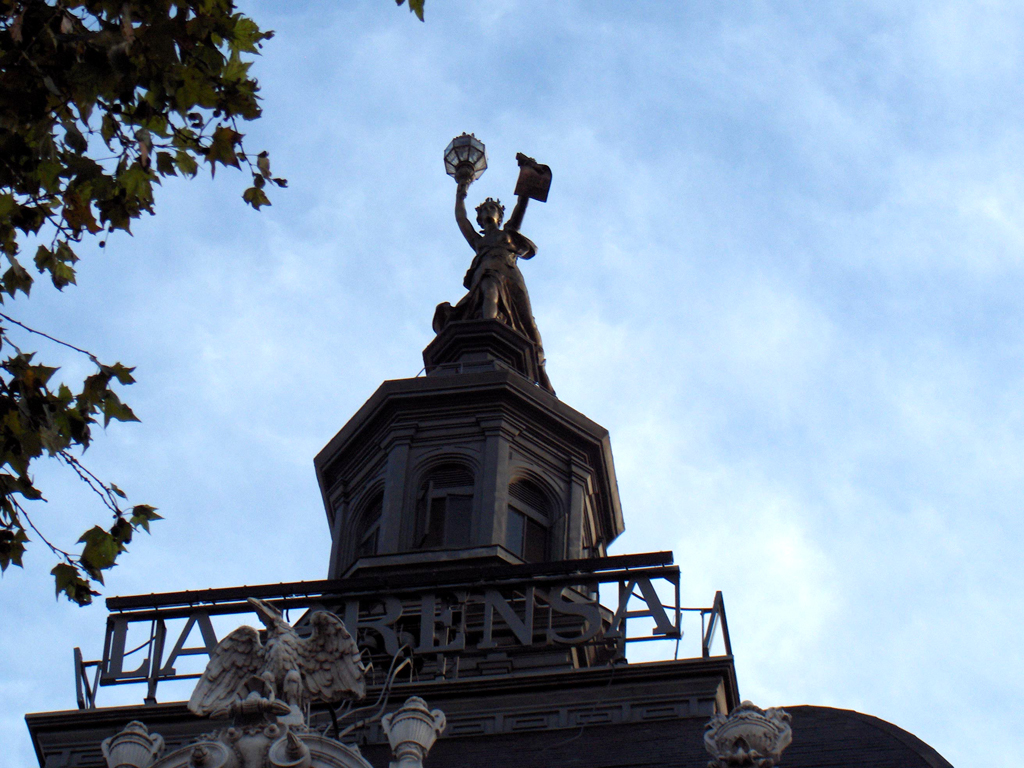 Ex edificio La Prensa, Buenos Aires.